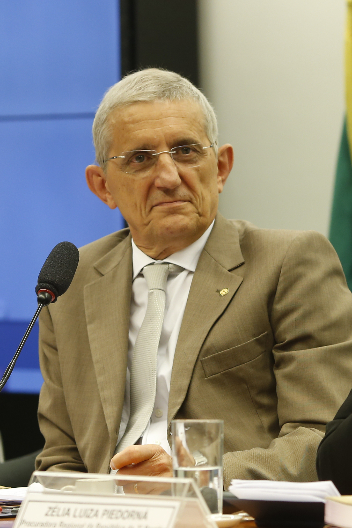 Comissão Especial da reforma da Previdência na Camara dos Deputados, Deputado Darcísio Perondi PMDB RS